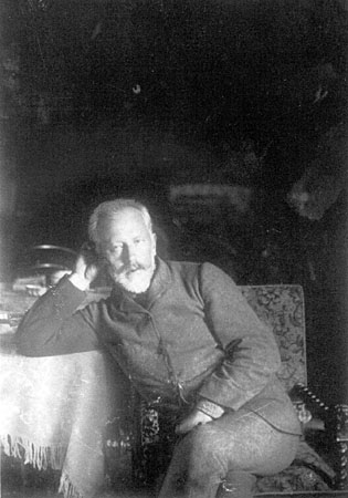 Pyotr Ilyich Tchaikovsky